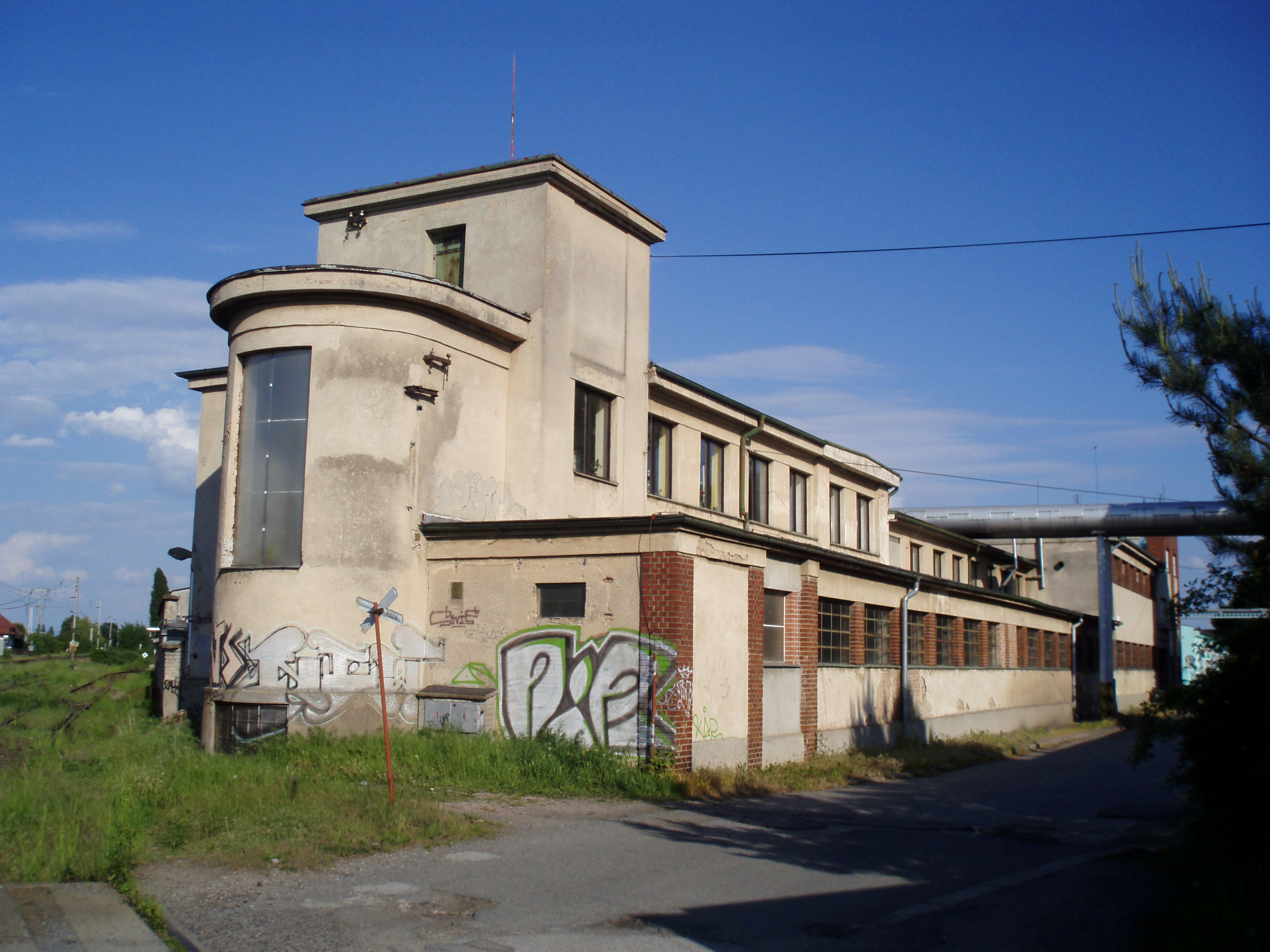 Bývalý Lakovar (Hradec Králové)